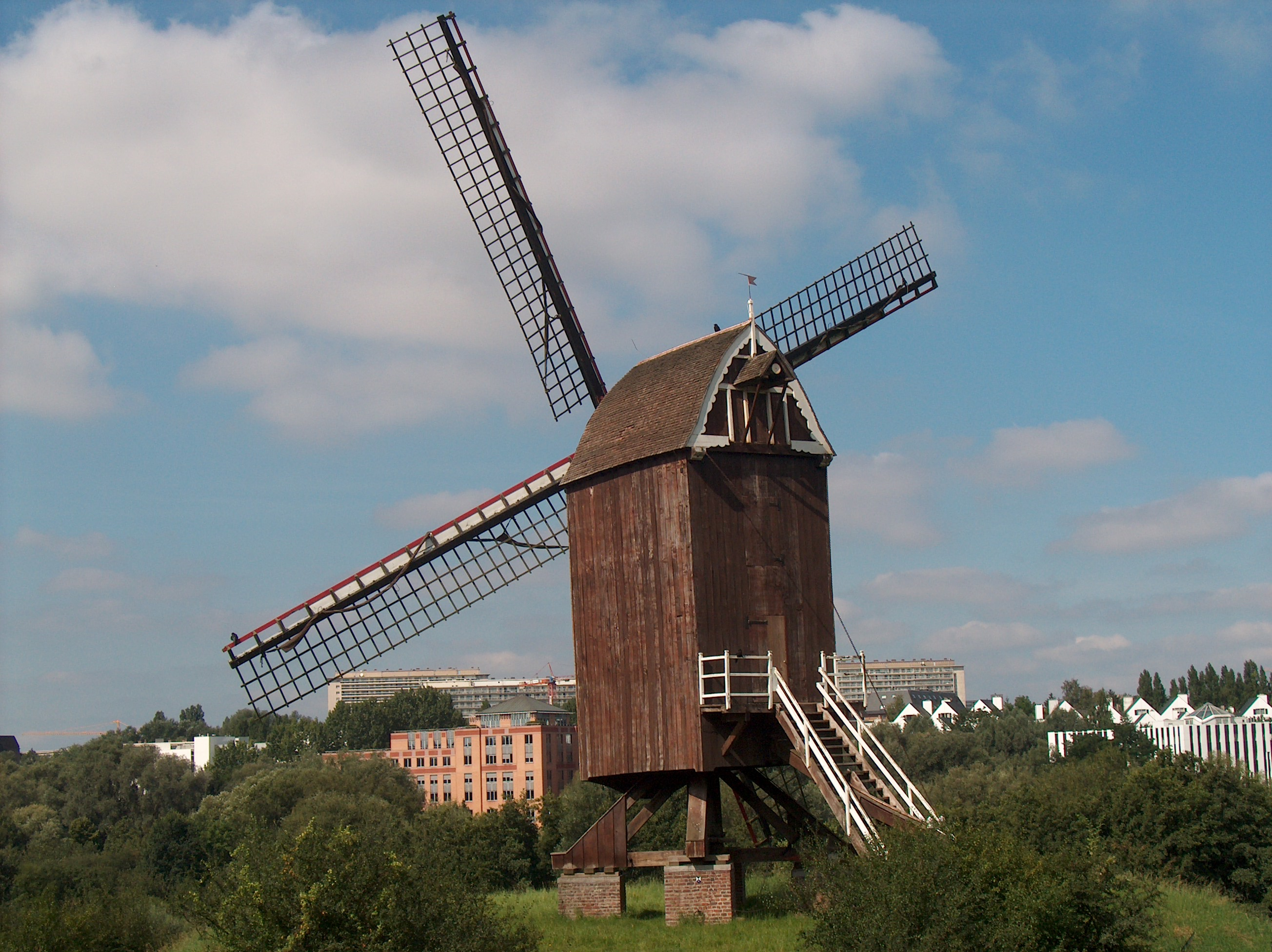 Moulin à vent de Woluwe-Saint-Lambert (Bruxelles)